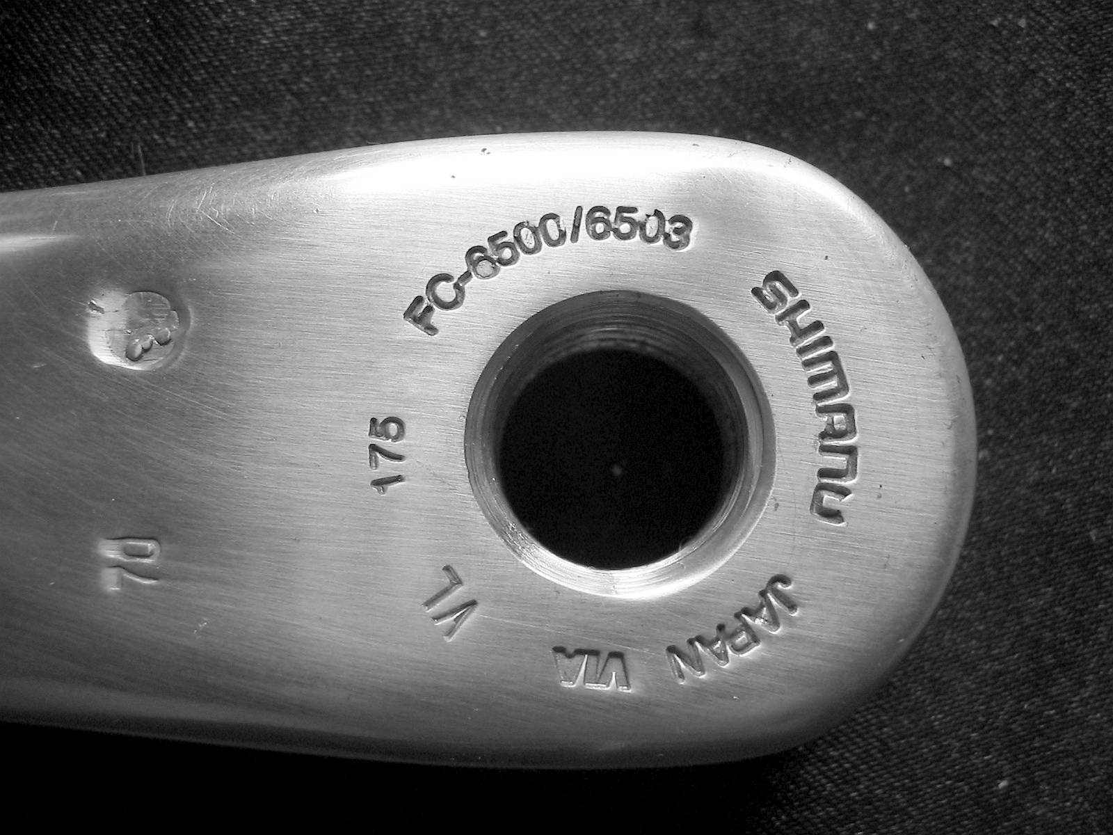 Shimano markings